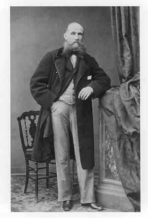 Portret pianista i kompozytora Juliana Fontany, ok. 1860